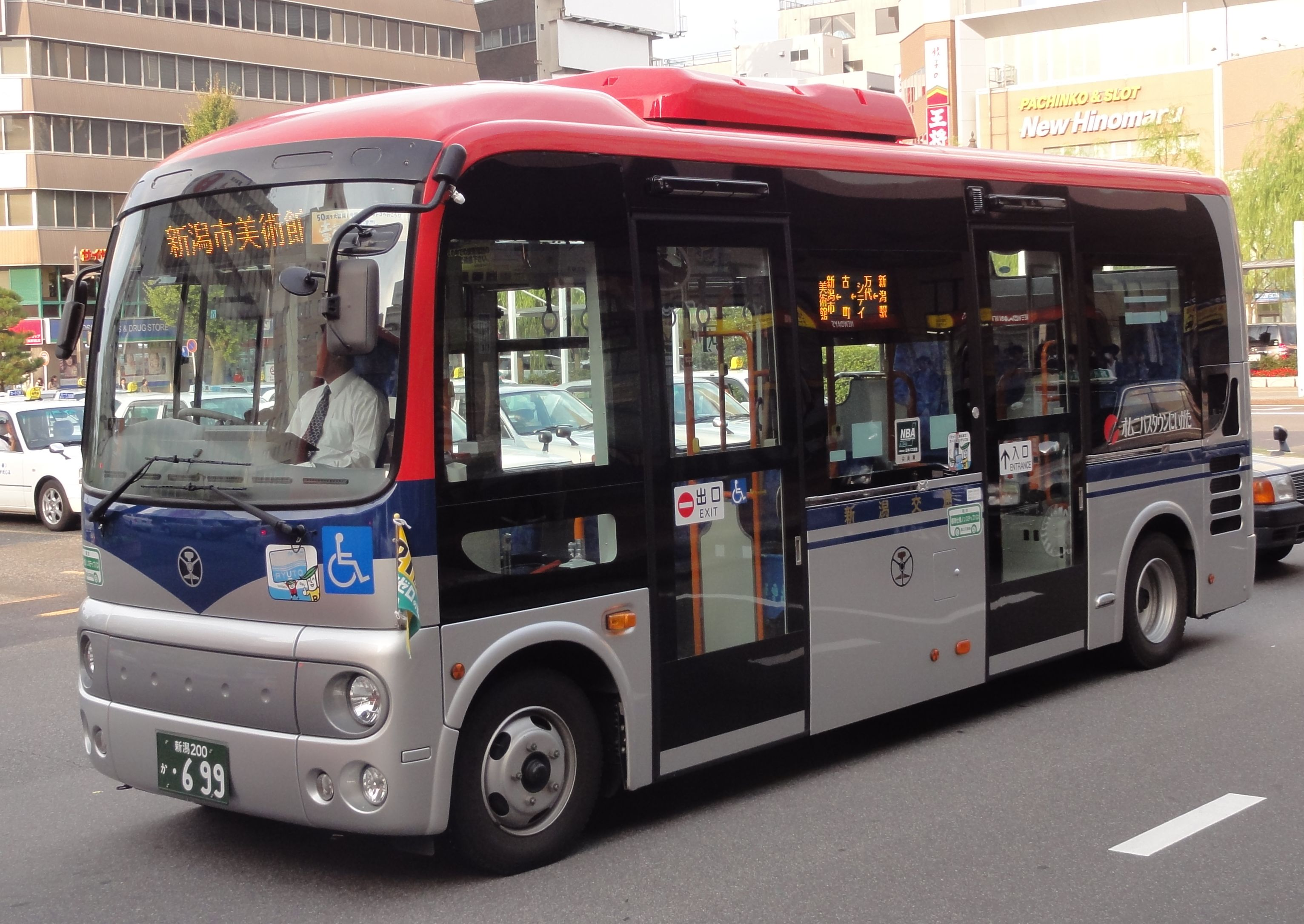 新潟交通 路線バス 新潟200か699